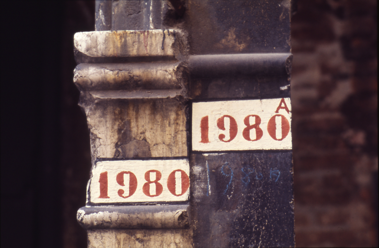 Serie fotografica : Venezia, 1981 / Paolo Monti. - Foglio: 1, Fotogrammi complessivi: 20/20 : Diapositiva, sviluppo cromogeno/ pellicola ; 35 mm. - ((Fonte: Agenda di Paolo Monti: Diapositive 24x36mm (1948-1982), presso Archivio Paolo Monti